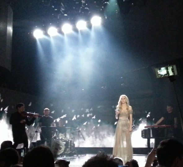 Polska piosenkarka Kasia Moś podczas występu w krajowych eliminacji do 62. Konkursu Piosenki Eurowizji.